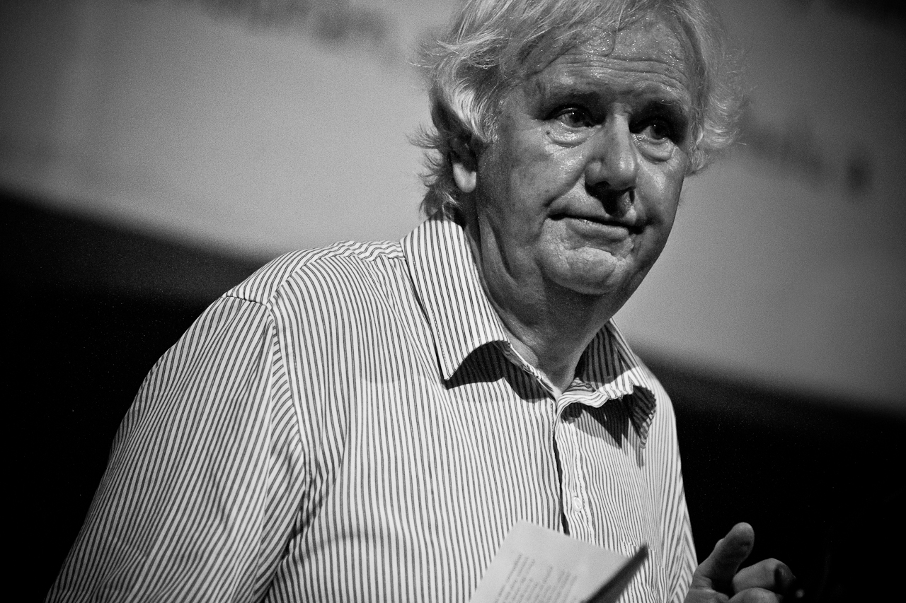 MAČ 2014